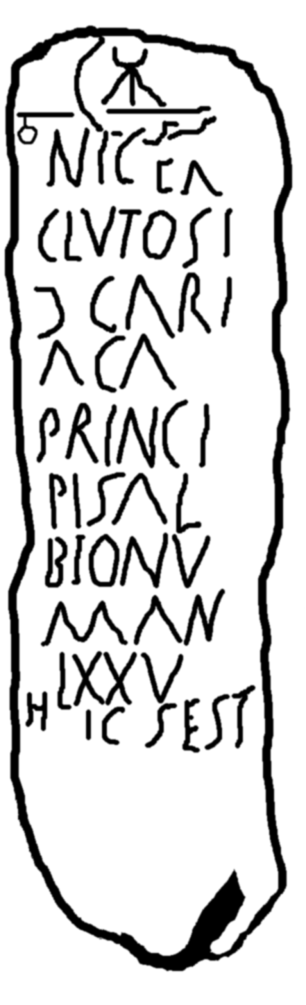 Debuxu d'una llábana funeraria alcontrada en A Veiga (Asturies) refería a Nicer Clutosi, habitante del castello Cariaca (en A Veiga) y que se convirtió en "príncipe" de los Albiones.